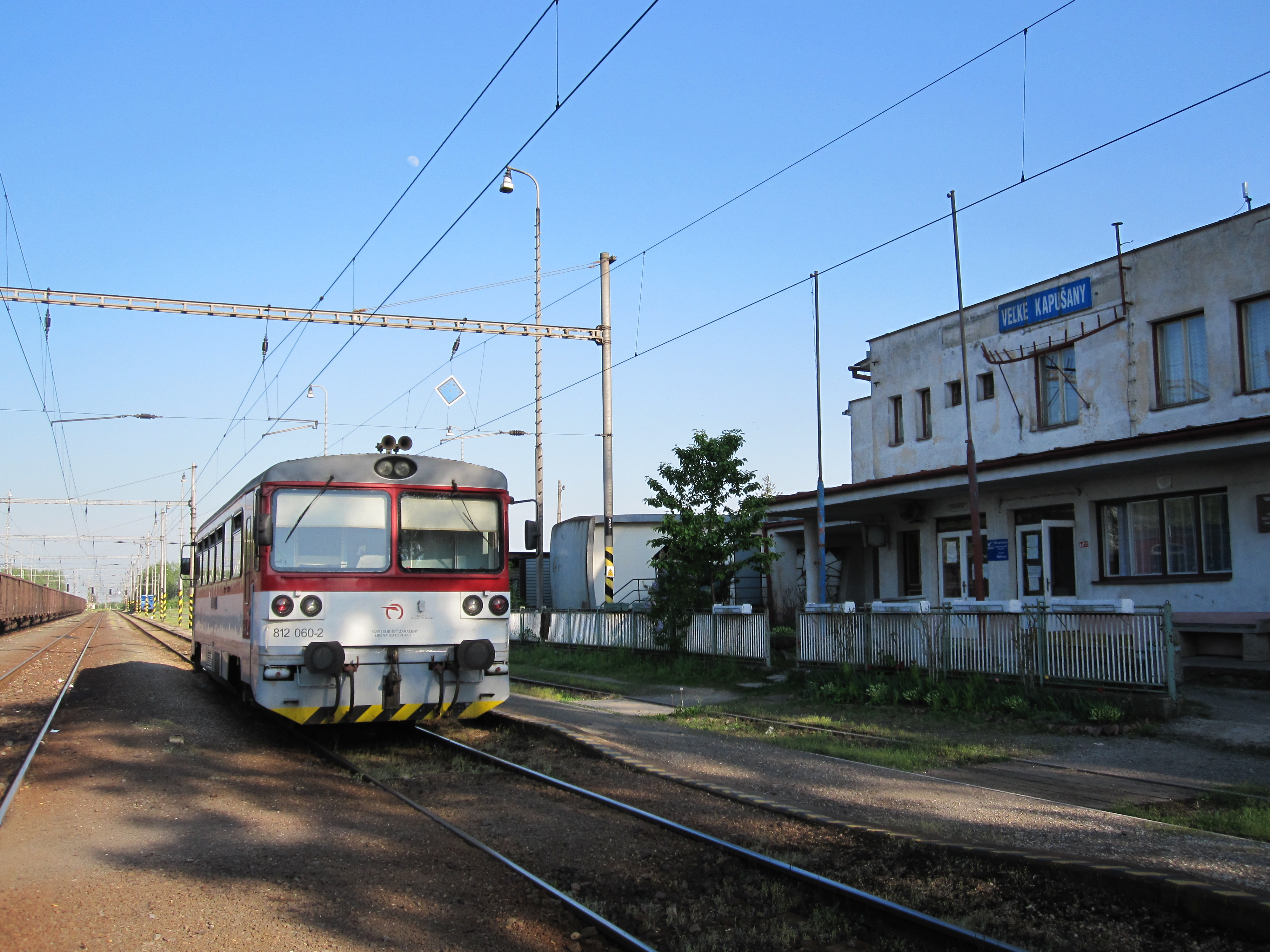 Motorový vůz 812.060 Železniční společnosti Slovensko, Veľké Kapušany